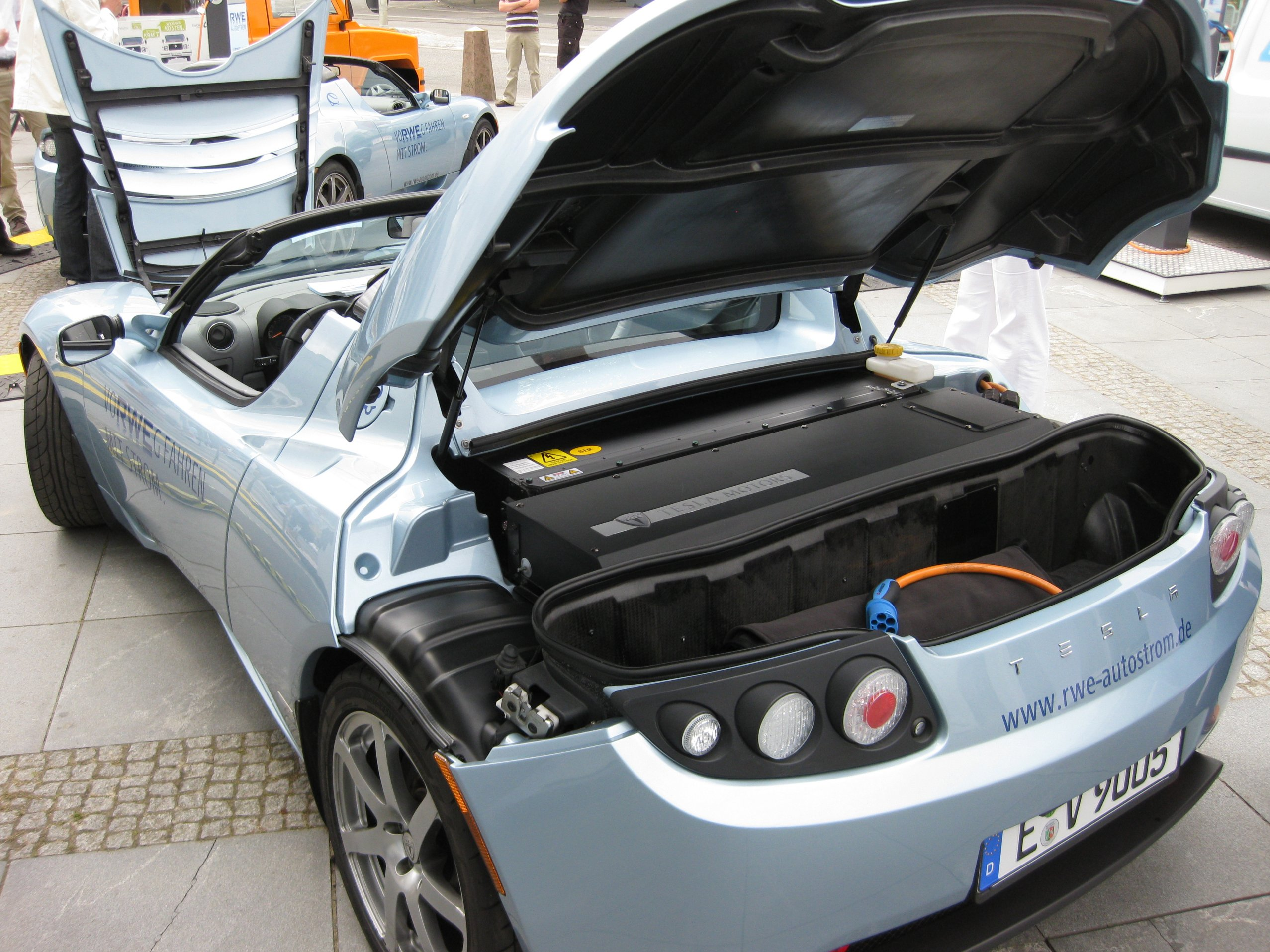 Der Elektromotor des Tesla